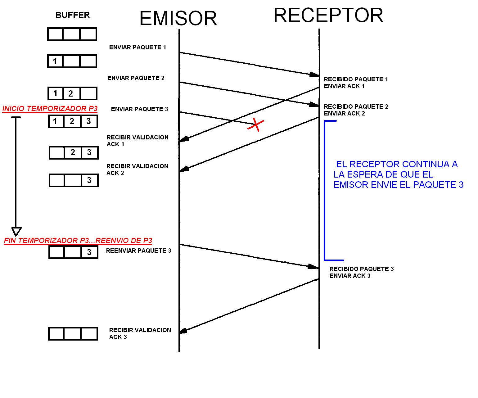 funcionamiento de la ventana deslizante durante el intercambio de información, actuación ante una perdida de datos mediante el temporizador de tramas